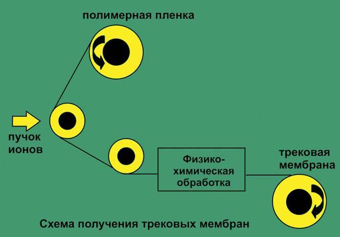 разрешен­ие OTRS|2012073110005081